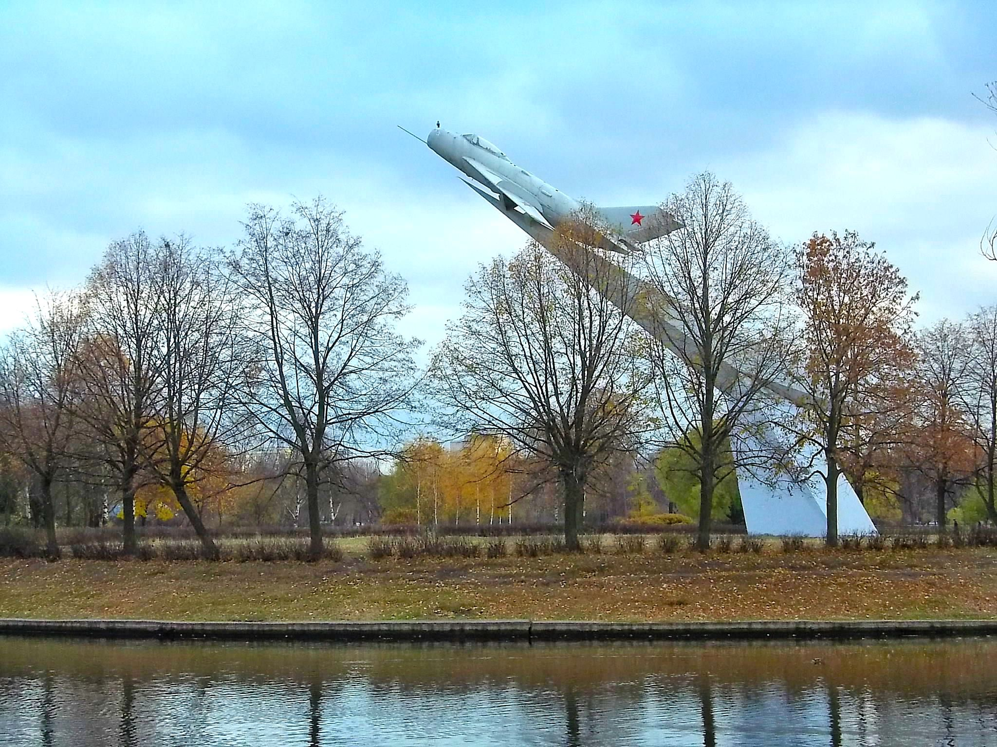 Памятник Миг-19